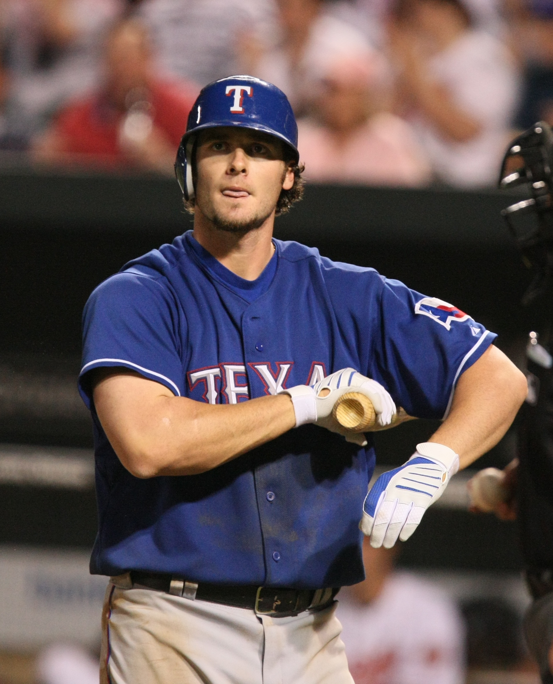 Jarrod Saltalamacchia